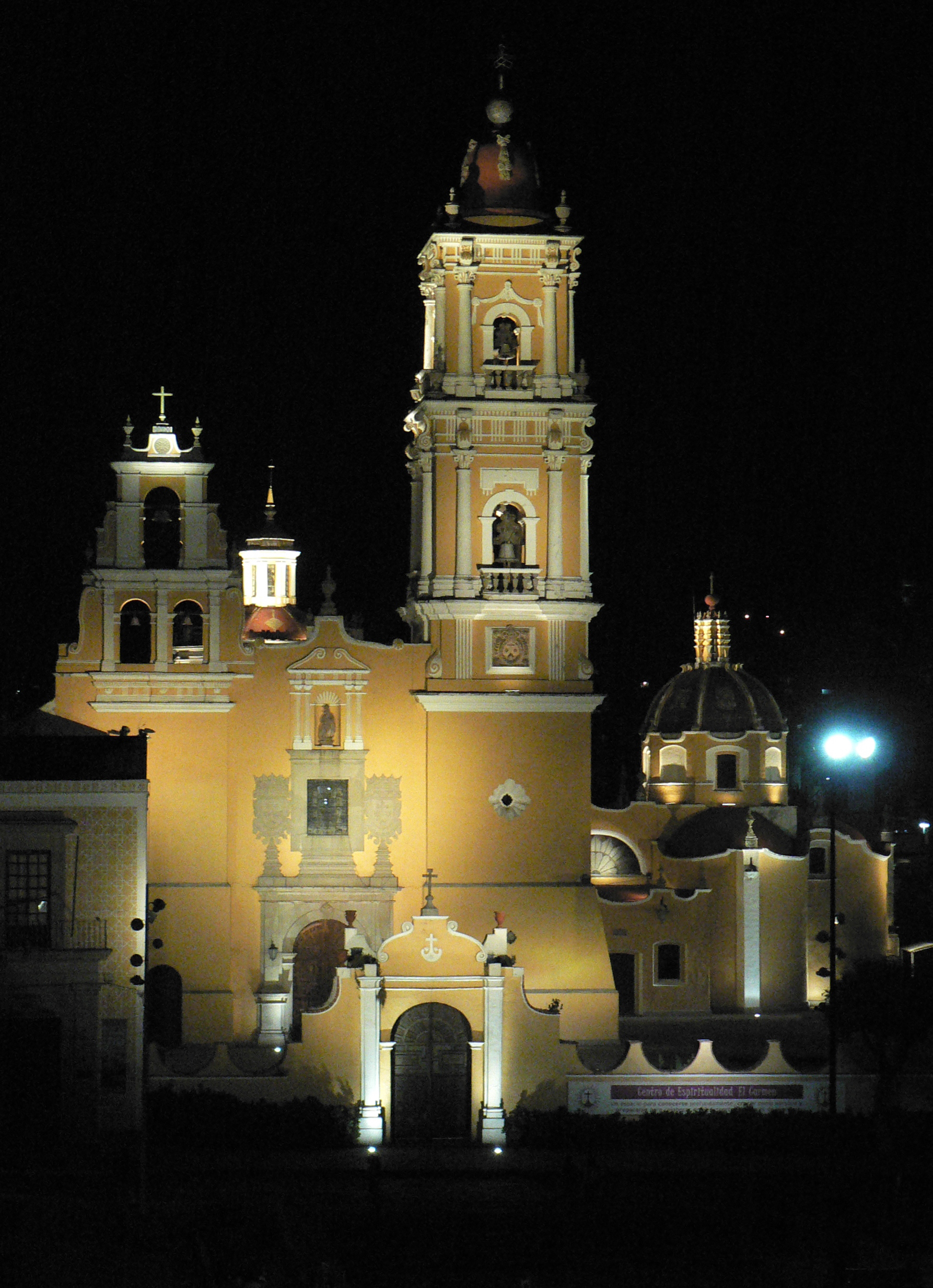 El Templo de la Virgen del Carmen fue bendecido el 25 de marzo de 1711. Su nombre original fue el de Convento de la Purísima Concepción de la Orden de los Carmelitas Descalzos. En abril de 1720 fue designado como sede del Colegio Moral para los Frailes Carmelitas de la Nueva España. Actualmente es considerado uno de los Conjuntos Conventuales más hermosos de México y además alberga al Museo de Bellas Artes desde el 7 de septiembre de 1945.